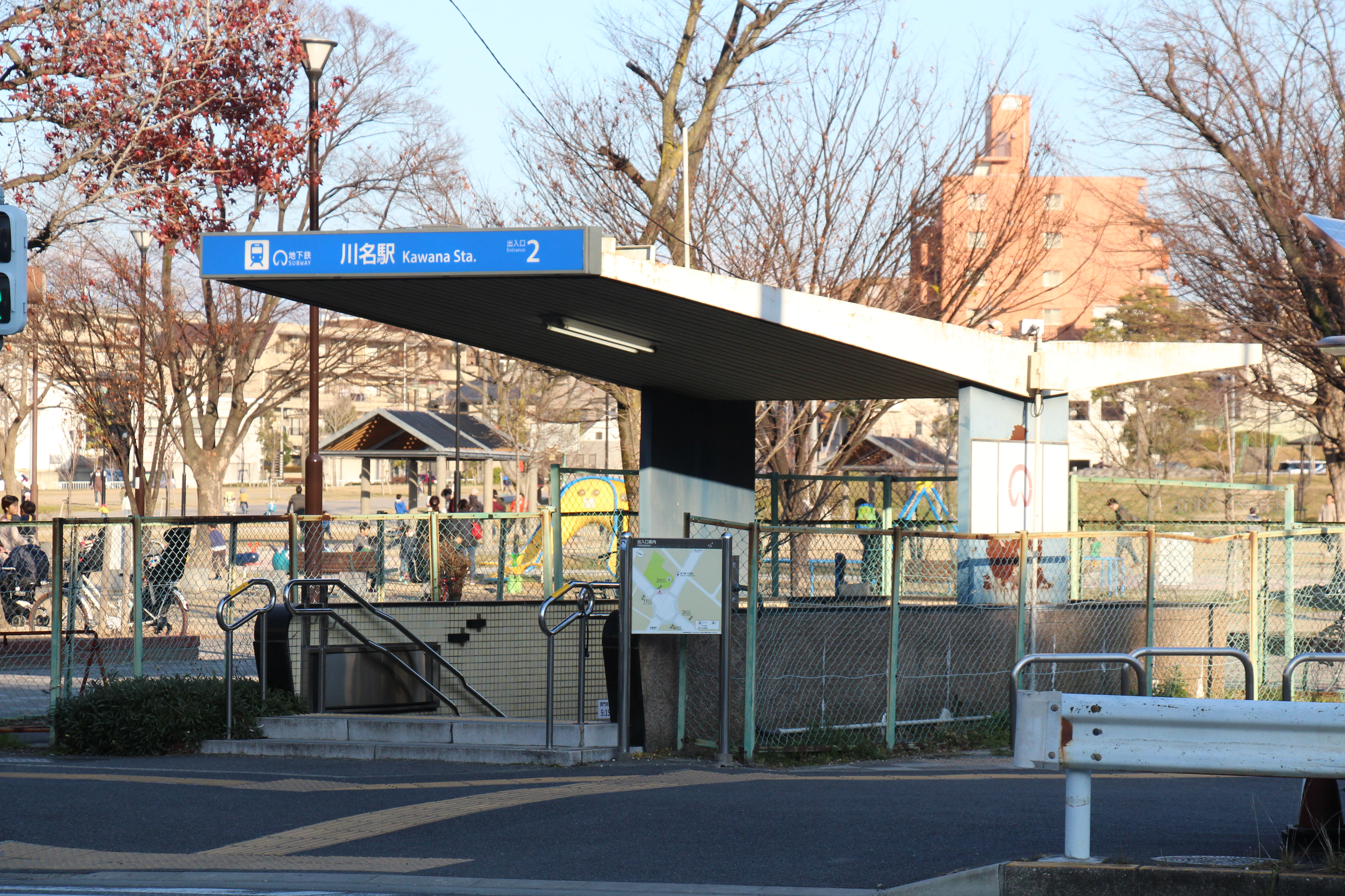 名古屋市営地下鉄川名駅2出入口